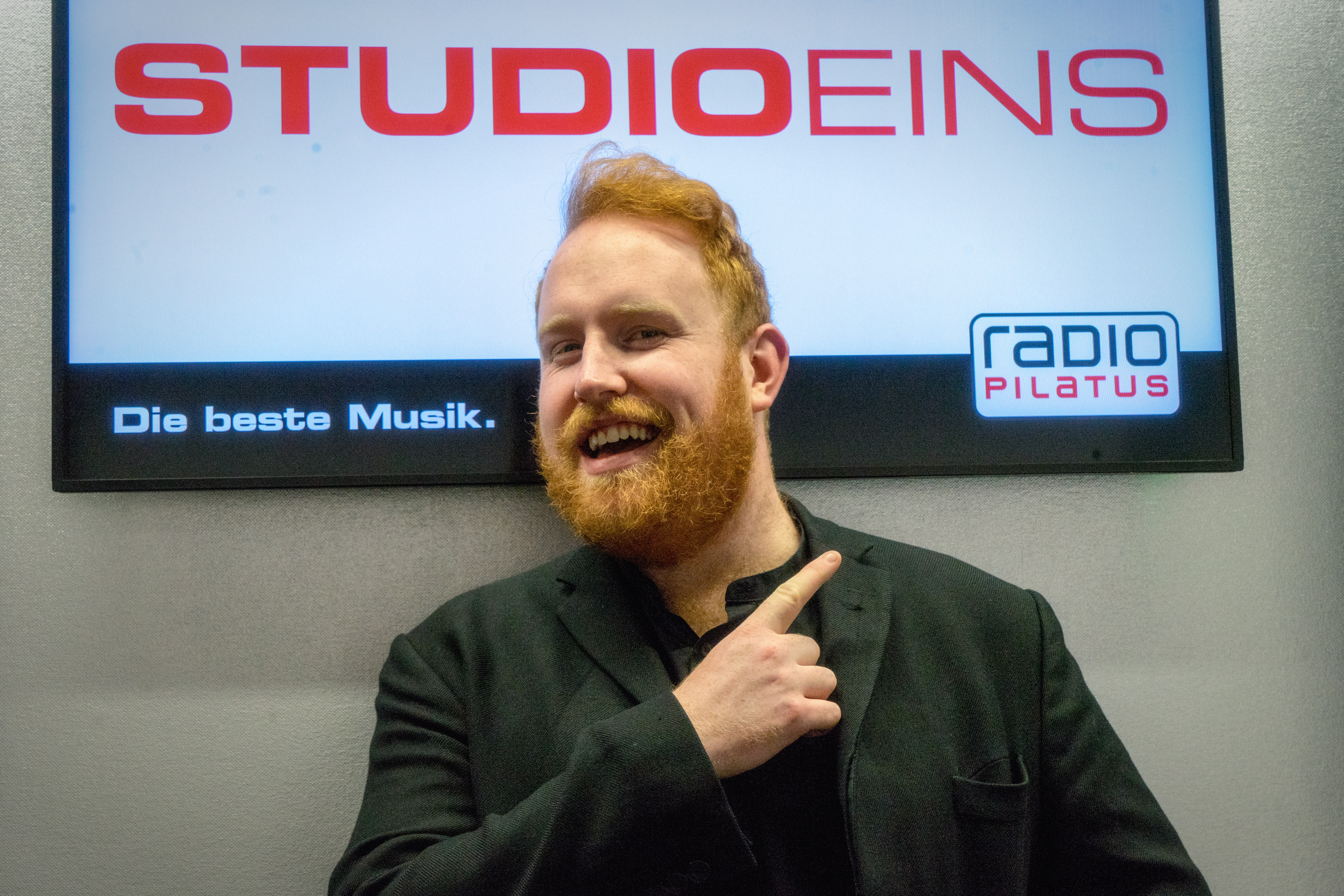 Gavin James bei Radio Pilatus (2018)